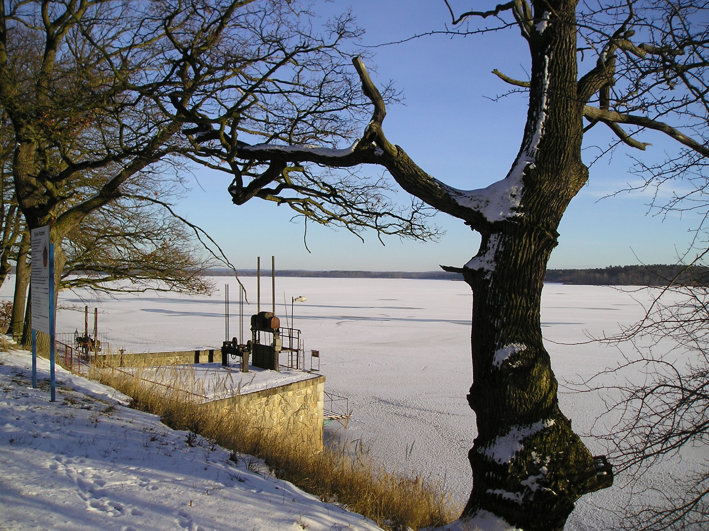 Rožmberk-zimní odpočinek "krále rybníků"